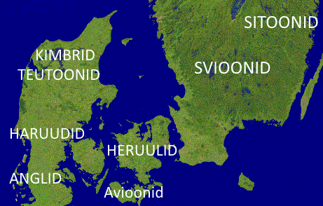 Kattegati väina ümbruses elanud germaanlased.